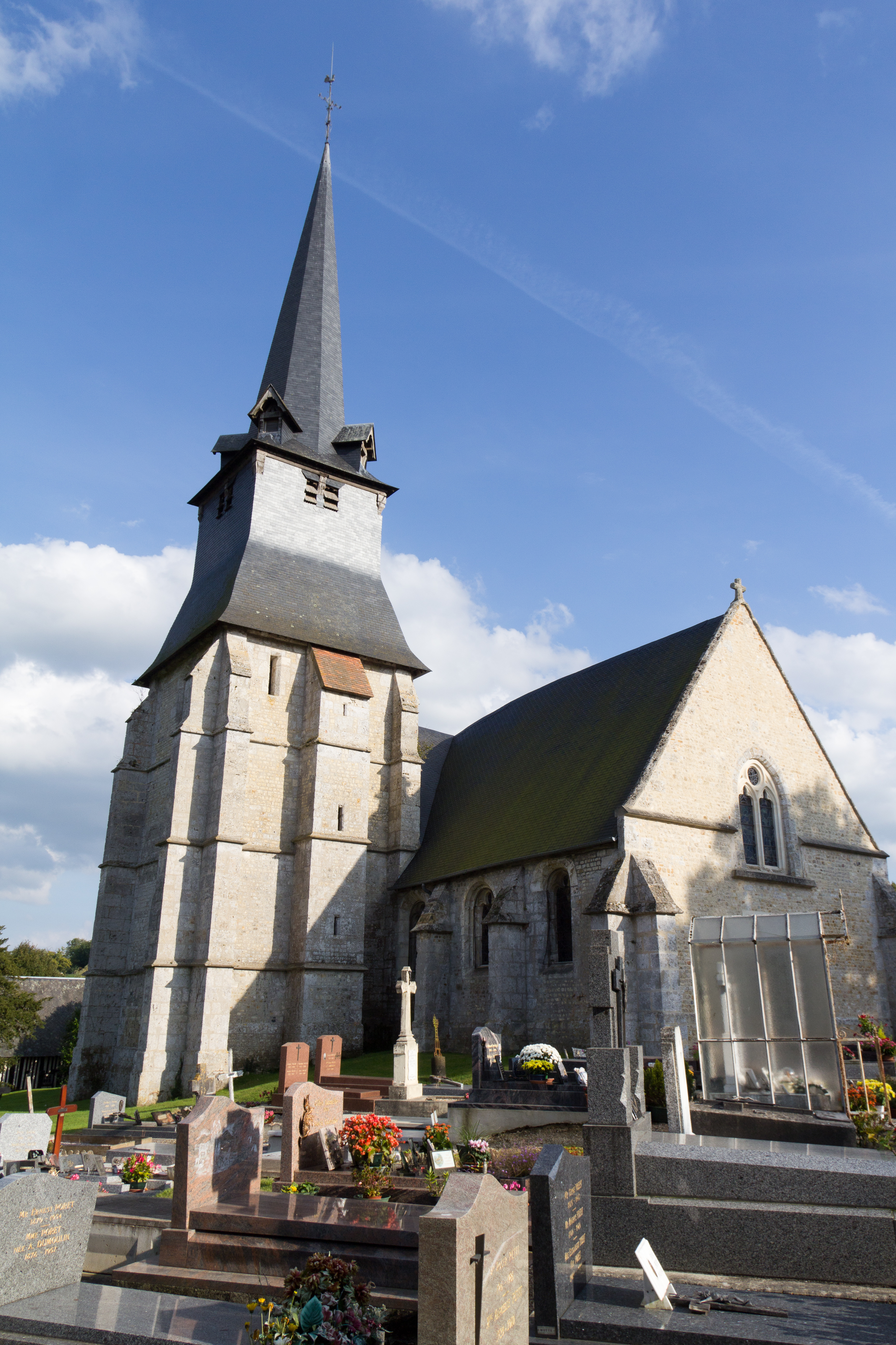 Vue nord-ouest de l'église Saint-Julien de Saint-Julien-sur-Calonne. .